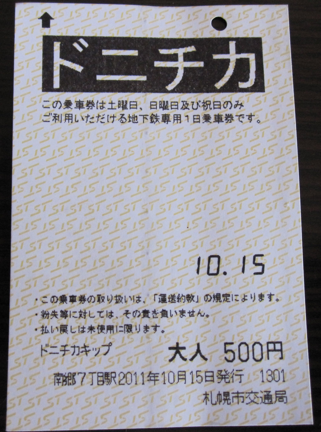 ドニチカキップ紙券（2011年プラスチック素材から変更）